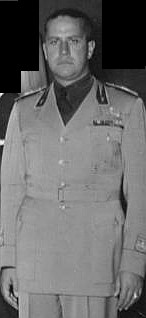 Münchener Abkommen, Staatschefs Zentralbild Das Münchner Abkommen vom 29.9.1938. Das am 29.9.1938 in München zwischen dem britischen Ministerpräsidenten Neville Chamberlain, dem französischen Ministerpräsidenten Edouard Daladier, dem italienischen Staatschef Benito Mussolini und Adolf Hitler geschlossene Abkommen ermächtigte das faschistische Deutschland zur Annexion tschechoslowakischen Gebietes. UBz: von links: Chamberlain, Daladier, Hitler, Mussolini, und der italienische Außenminister Graf Galeazzo Ciano. Im Hintergrund von Ribbentrop und von Weizsäcker. 12 766-38 [Scherl Bilderdienst] Abgebildete Personen: Chamberlain, Neville Arthur: Premierminister, Großbritannien Daladier, Edouard: Ministerpräsident, Vorsitzender Sozialistische Partei, Frankreich Ciano, Galeazzo Graf: Außenminister, Italien (GND 119178362) Hitler, Adolf: Reichskanzler, Deutschland Mussolini, Benito: Ministerpräsident, Regierungschef, Chef des Faschistischen Großrates, Italien Weizsäcker, Ernst von Freiherr: Diplomat, Staatssekretär im Auswärtigen Amt, SS-Führer, Deutschland